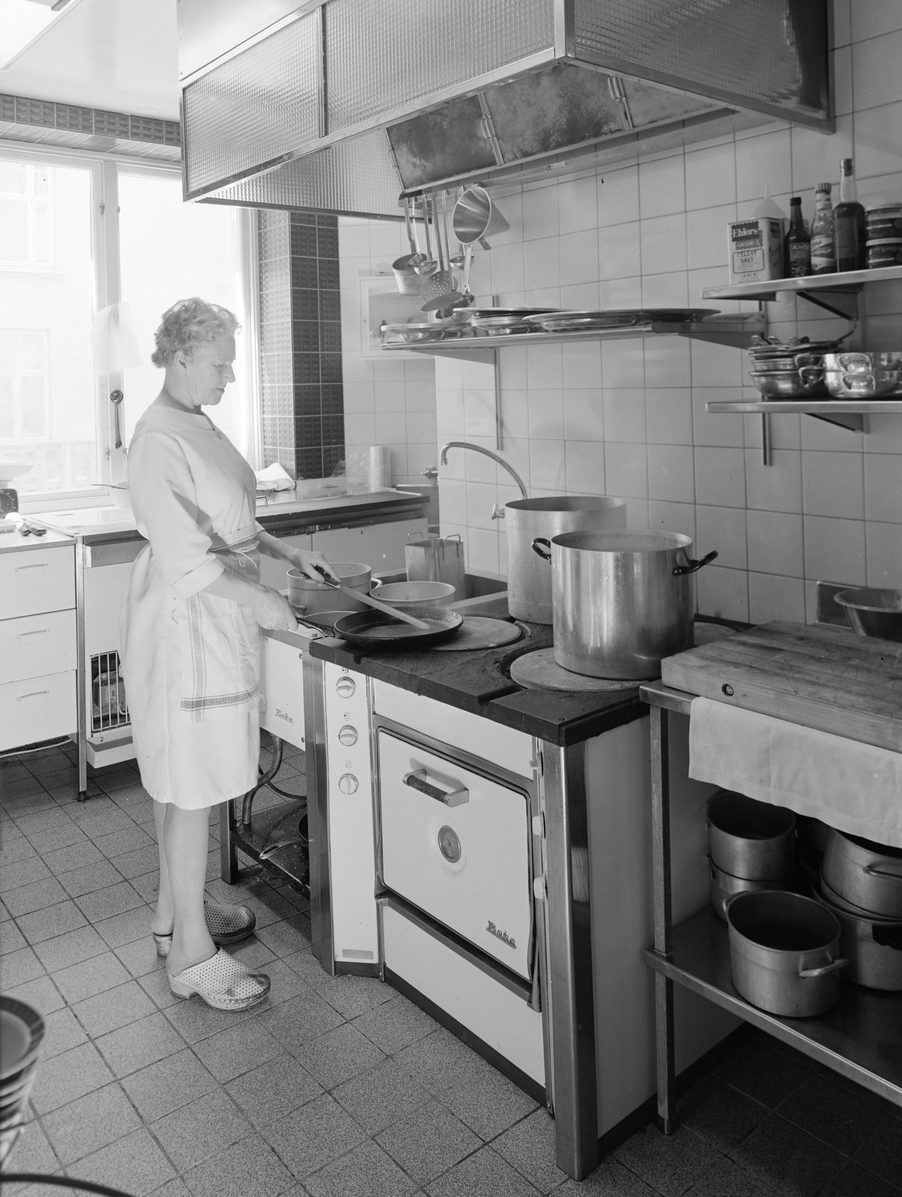 Kjøkkenet på restaurant Coq d’Or, Skovveien 15, i 1970. Foto: Atelier Rude. Fra Byhistorisk samling hos Oslo Museum.